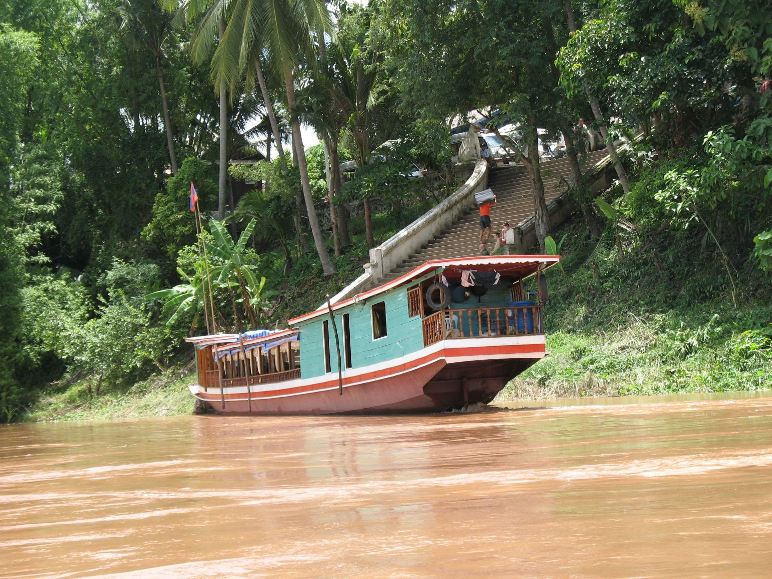 Mekong-Ausflugsschiff bei Luang Prabang